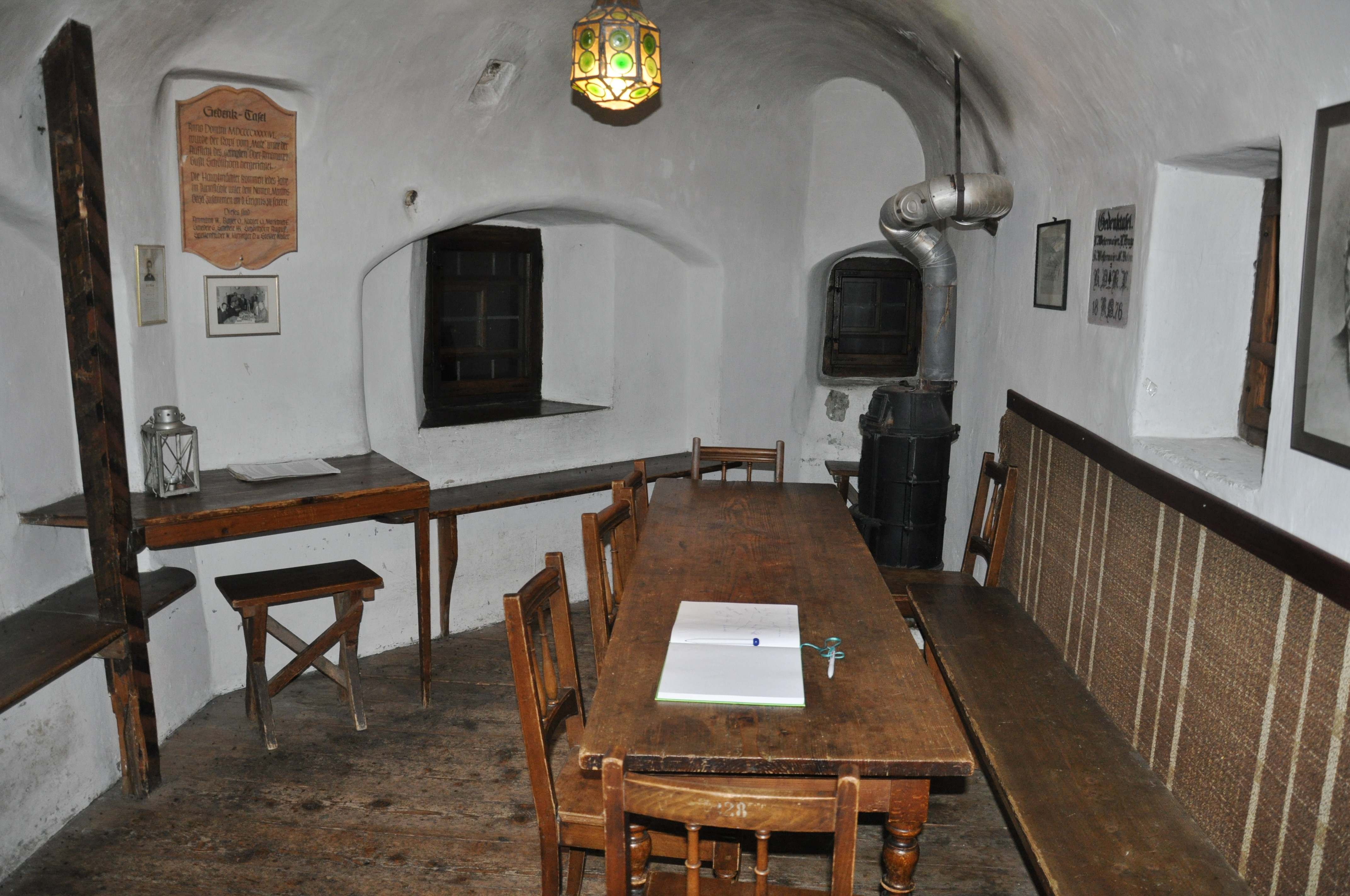 Memmingen, St. Martin, Turmstübchen